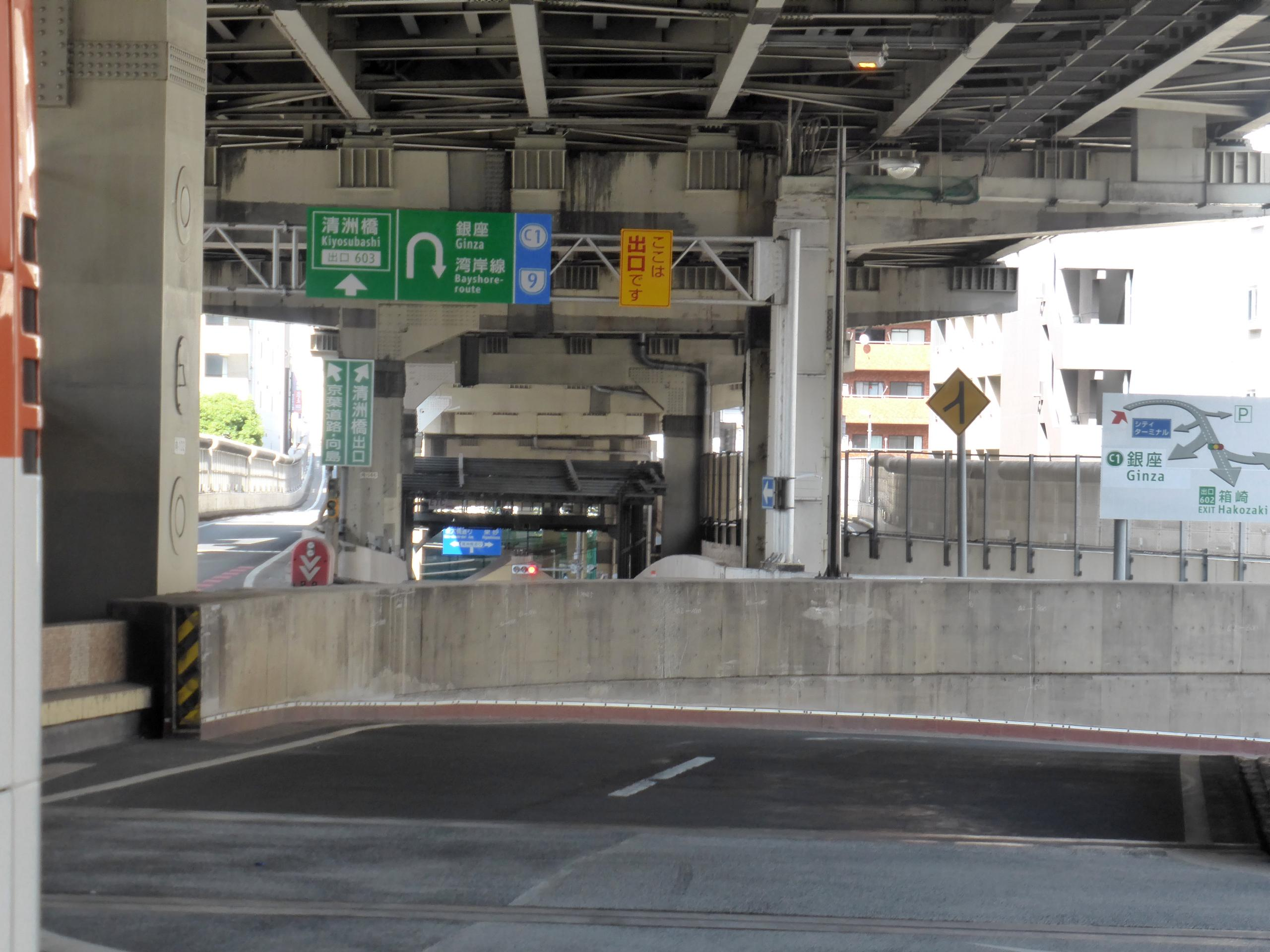 箱崎ロータリーから一般道に下りる道は2つ